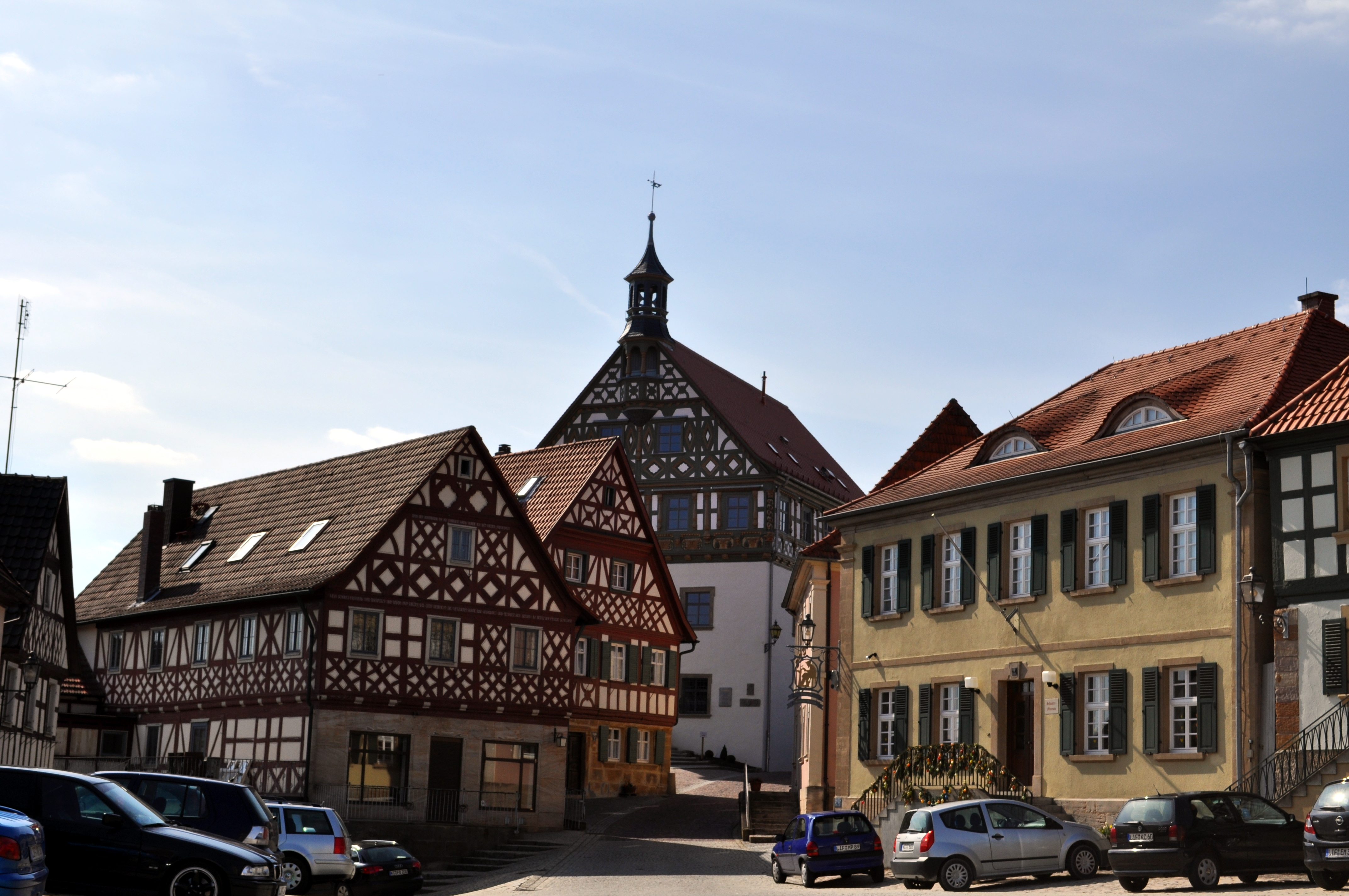 Rathaus (Hintergrund), Schustermuseum (rechts) und zwei historische Fachwerkhäuser auf dem Marktplatz